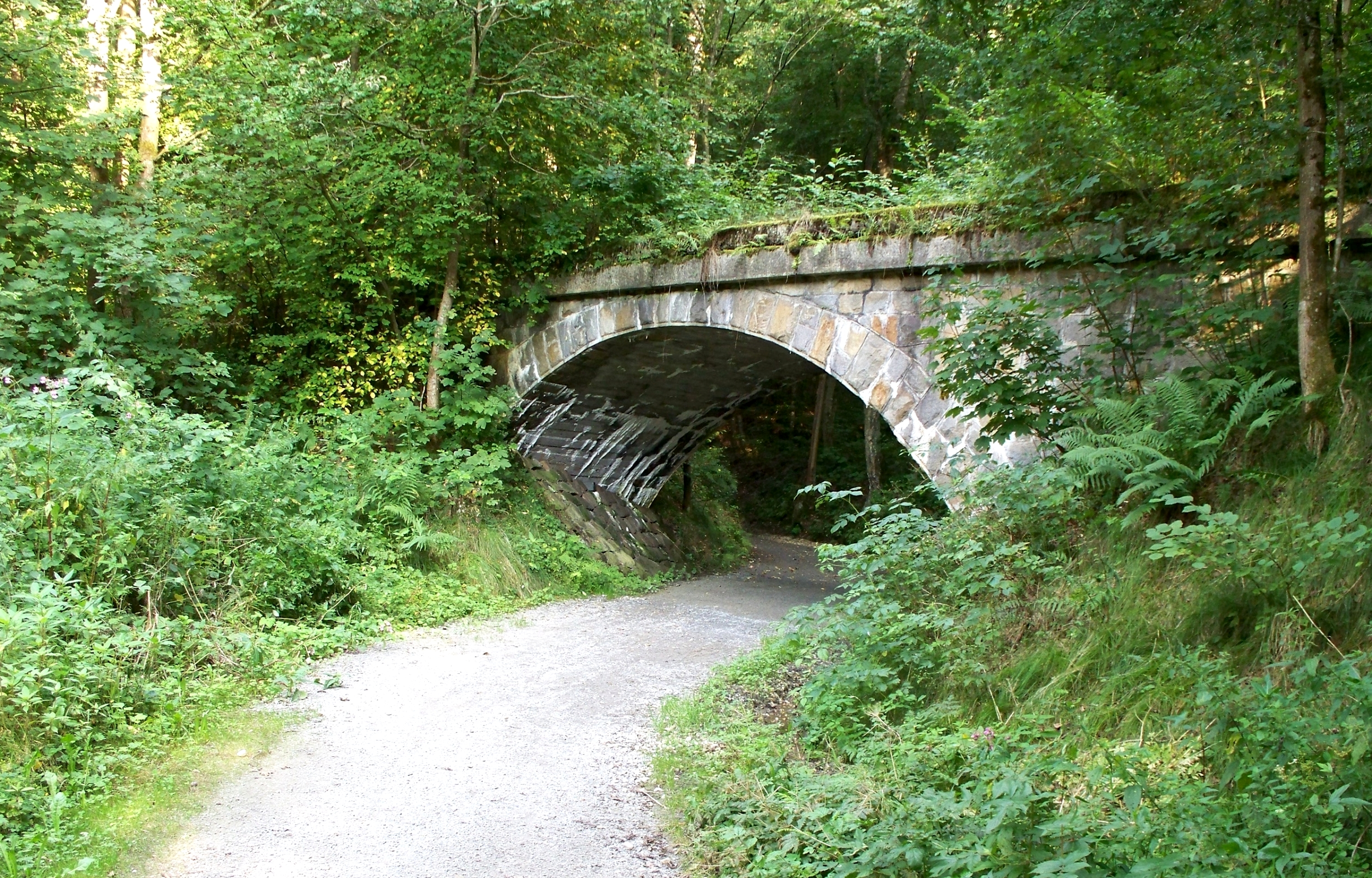 Eine ehemalige Eisenbahnbrücke neben der Vils im Naturschutzgebiet Vils-Engtal. Im Gebiet des heutigen Naturschutzgebiets wurde vor etwa 70 Jahren Granit abgebaut. Auf dieser Brücke verlief die Bahnstrecke Aidenbach-Vilshofen, die auch industriell vom Granitwerk genutzt wurde.